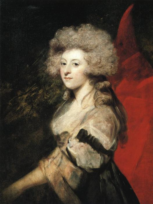 Portrait of Maria Fitzherbert (1756-1837)